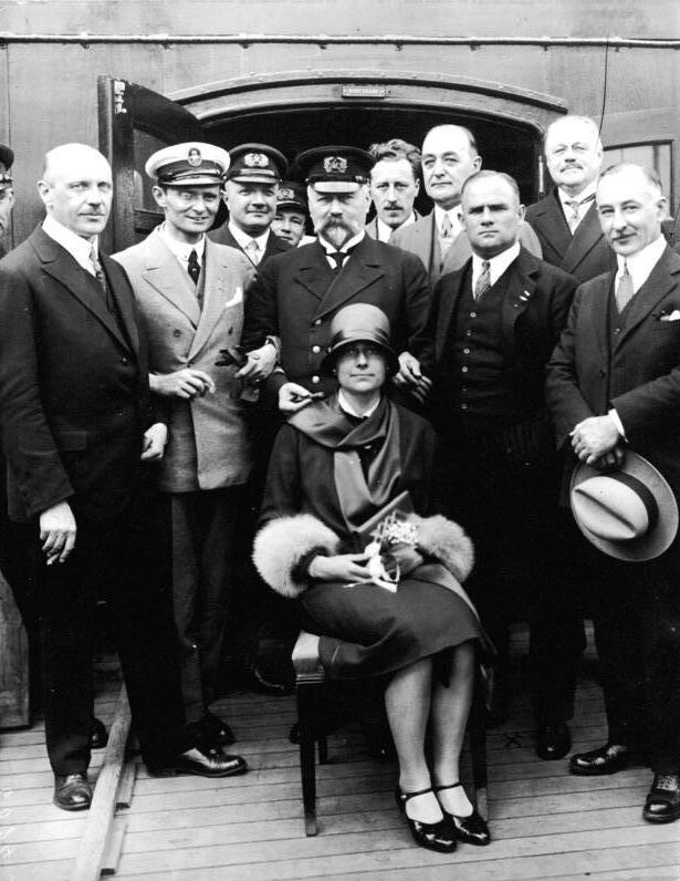 Die Heimkehr der Ozeanflieger Hauptmann Köhl und von Hünefeld! Erste Aufnahme der Ozeanflieger an Bord der Norddeutschen-Lloyddampfers, "Columbus" während der Überfahrt. (x) Hauptmann Köhl Mitte stehend der Kapitän der "Columbus" daneben von Hünefeld vorn sitzend Frau Hauptmann Köhl.